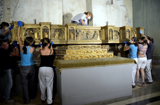 Estat de restauració del retaule de la pietat de la Seu d'Urgell